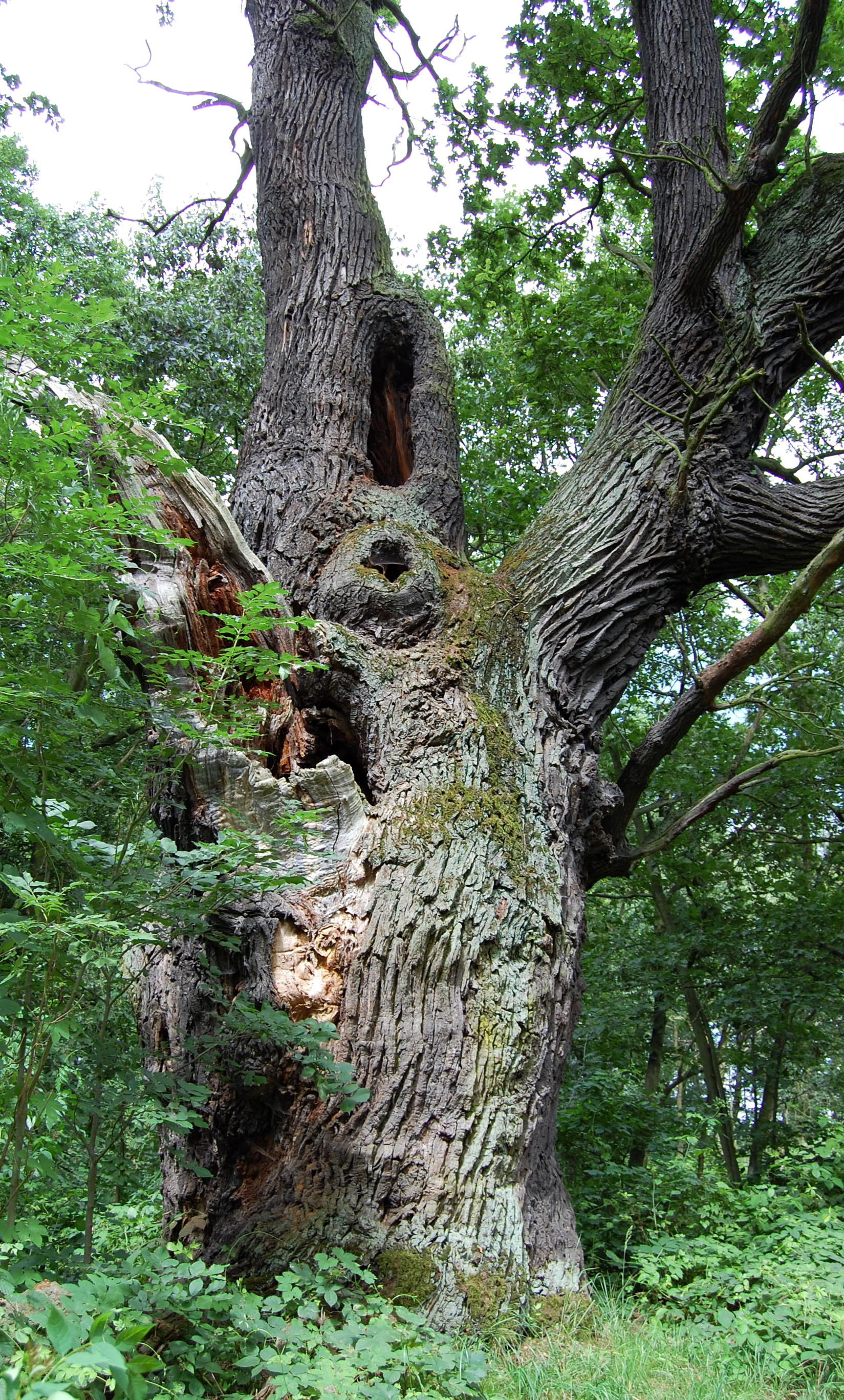 Stamm der Kaiser-Wilhelm-Eiche bei Straupitz, Landkreis Dahme-Spreewald, Brandenburg, Deutschland.